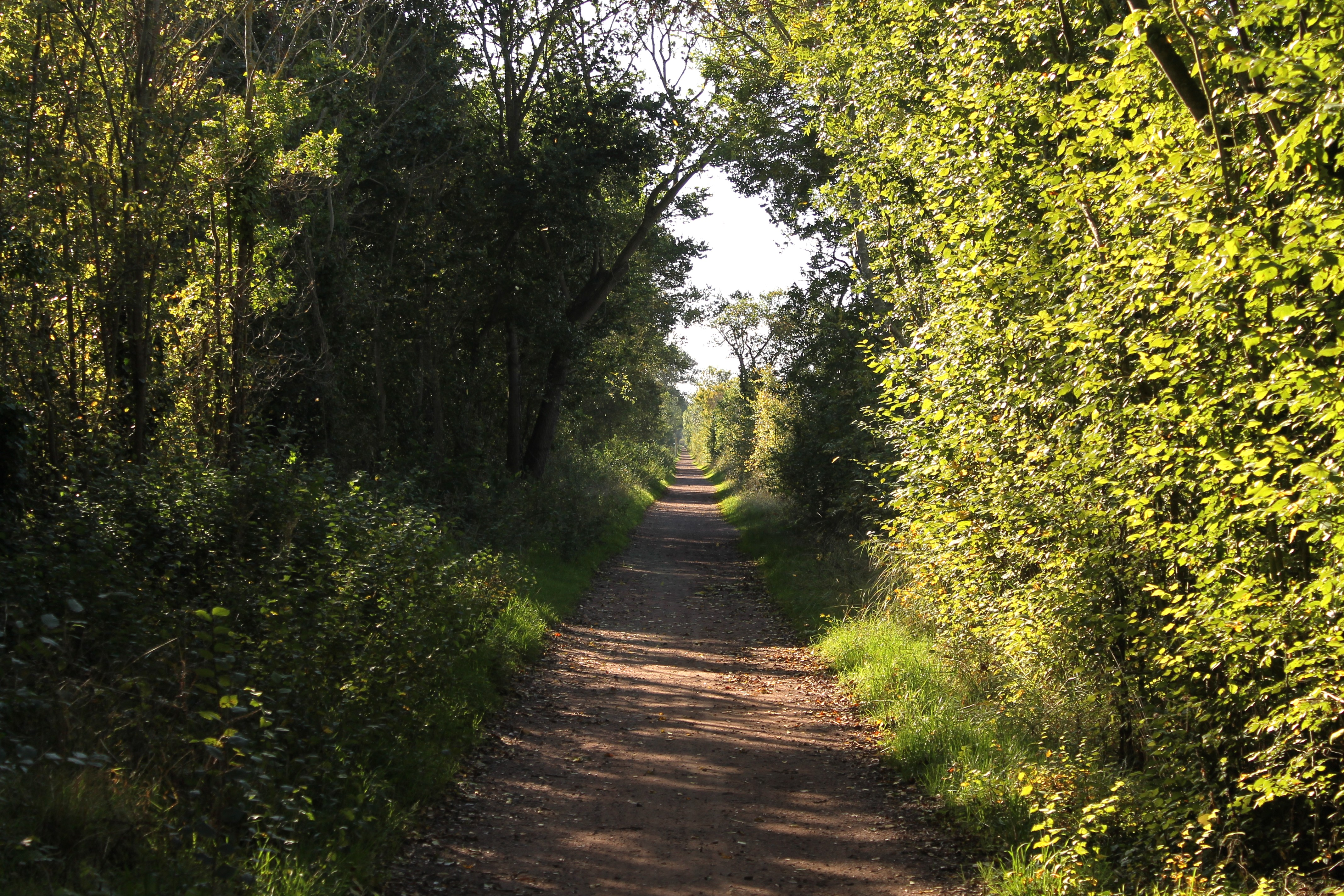 Voie verte sur la rive droite de l'Orne à Amfreville (Calvados)